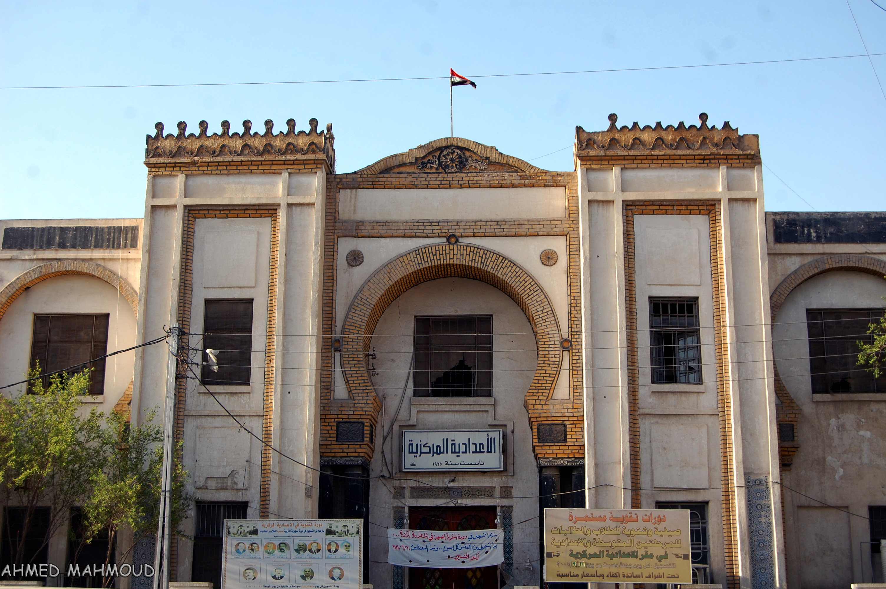 مبنى الاعدادية المركزية في شارع الاستقلال في البصرة